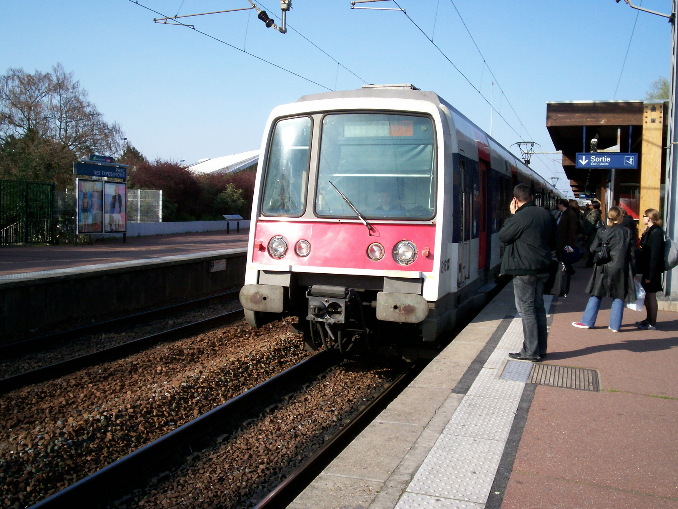 Rame MI 79 au Parc des Expositions qui assure la mission LETO